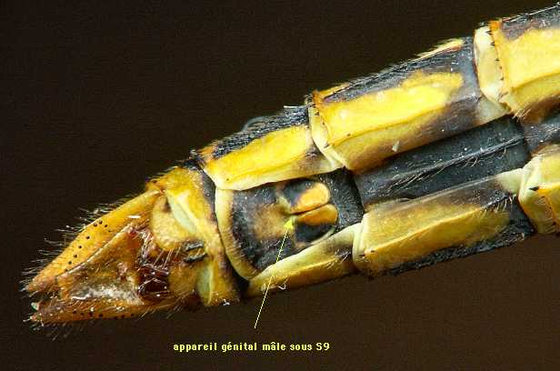 Appareil génital et pièces copulatrices de mâle (Sympetrum fonscolombii)